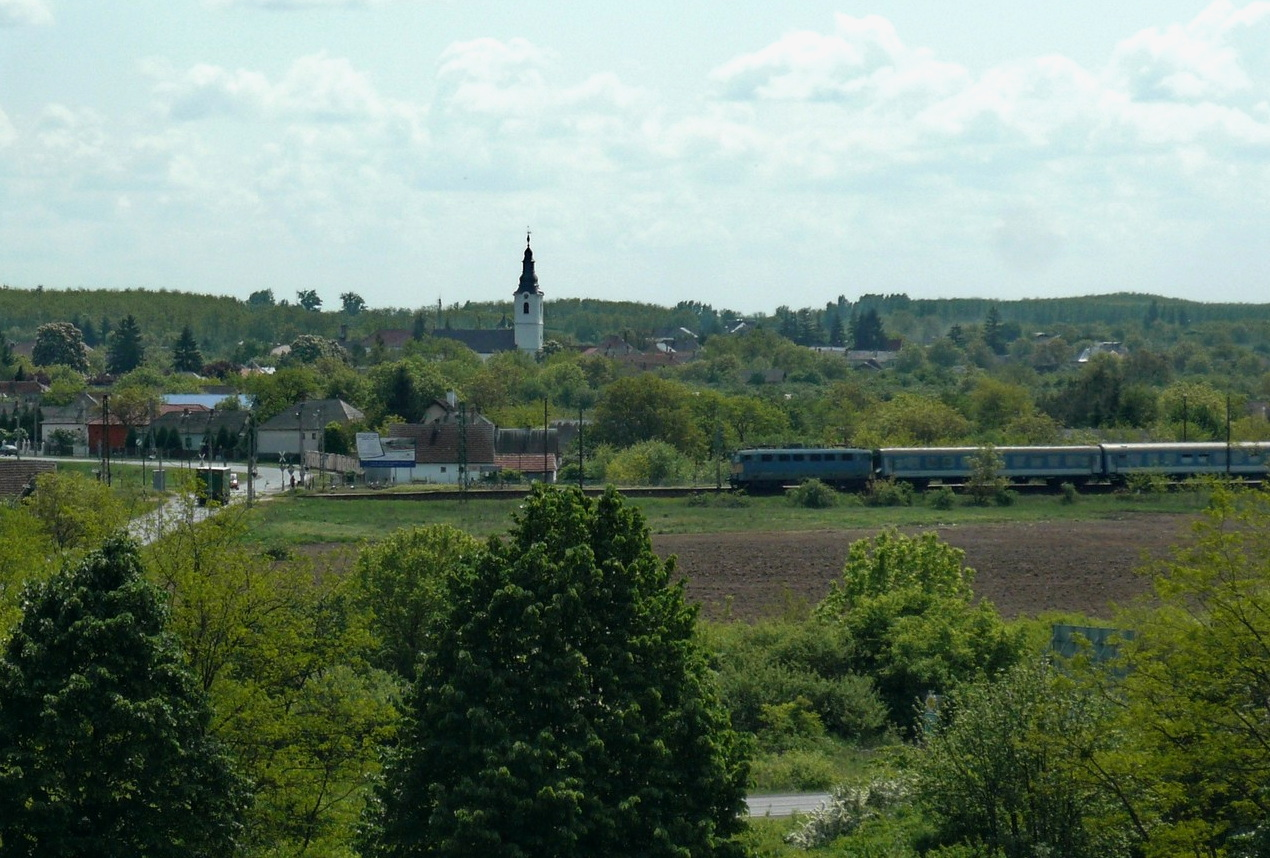 Tiszabezdéd, 4624 Hungary